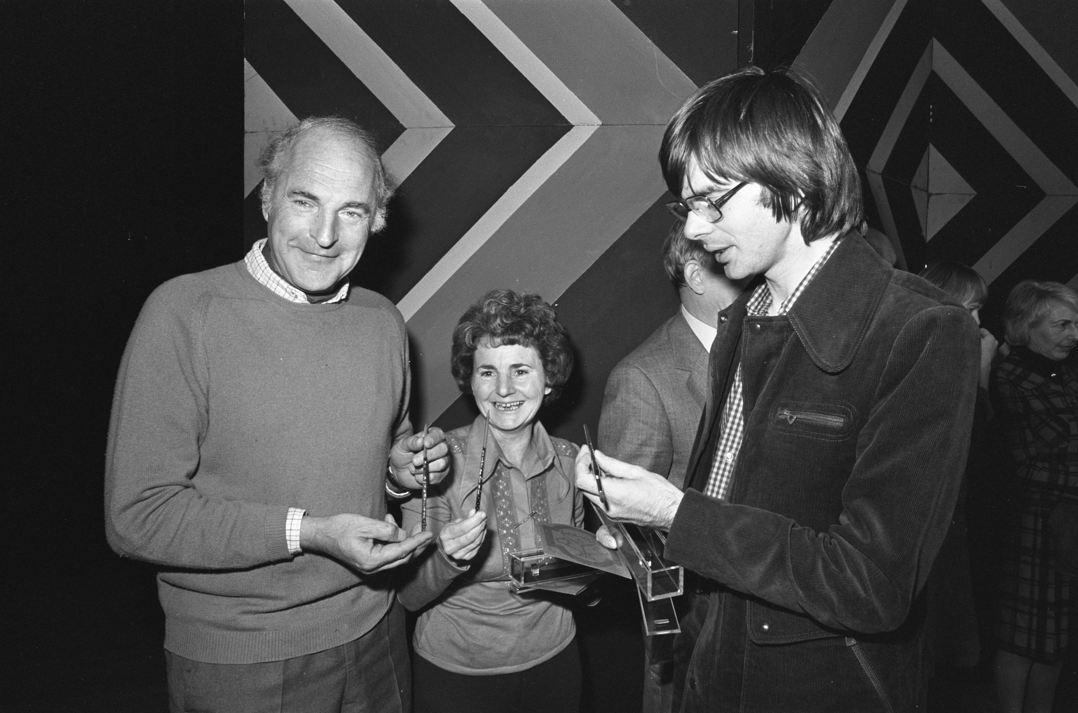 Kinderboekenweek geopend met bekroning van kinderboeken in Rotterdam; v.l.n.r. Jaap ter Haar , Thea Beckman en Wim Hofman. Datum 19 oktober 1974